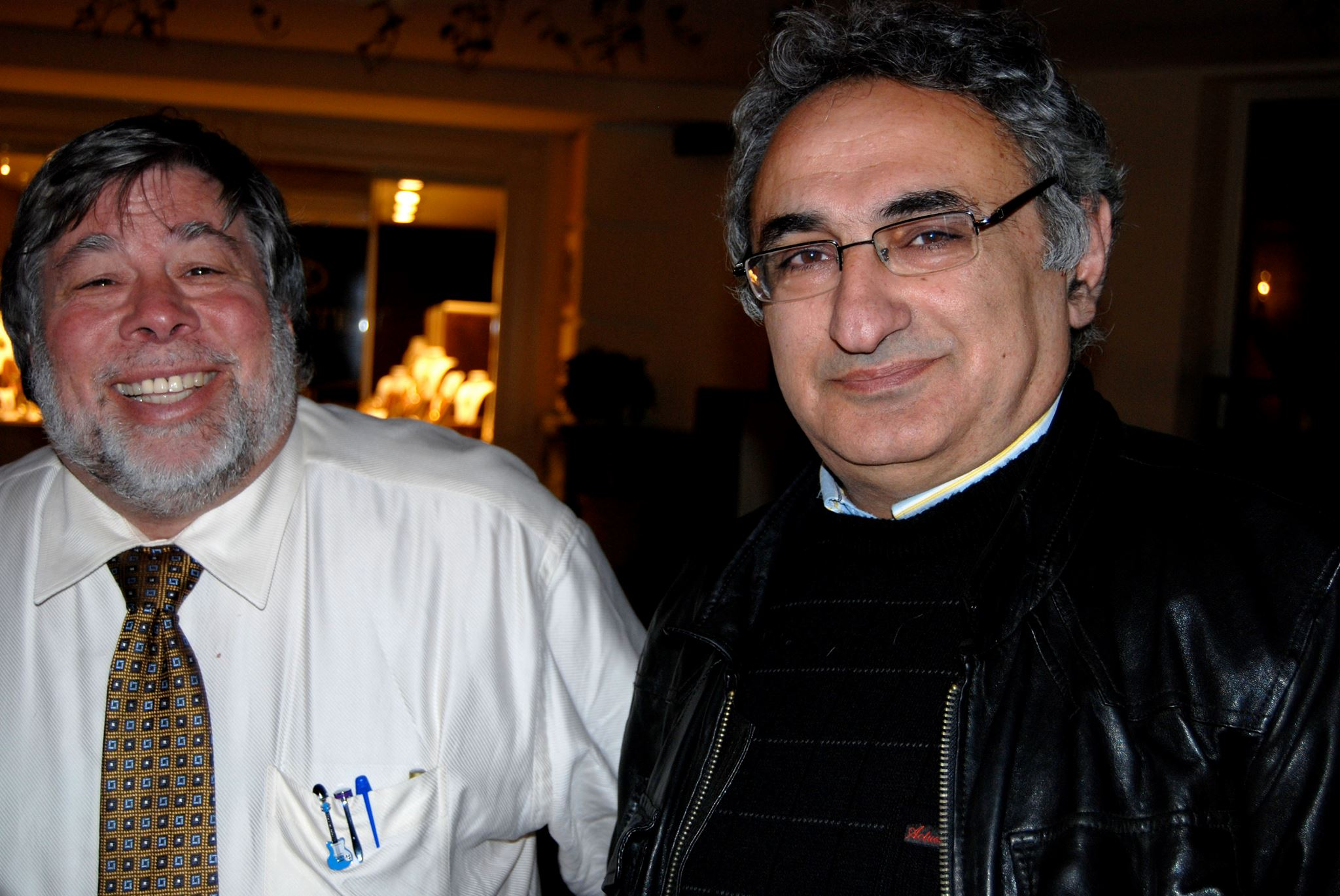 Steve Wozniak & Hovhannes Kizoghian in Yerevan, Armenia, Noveber, 2011